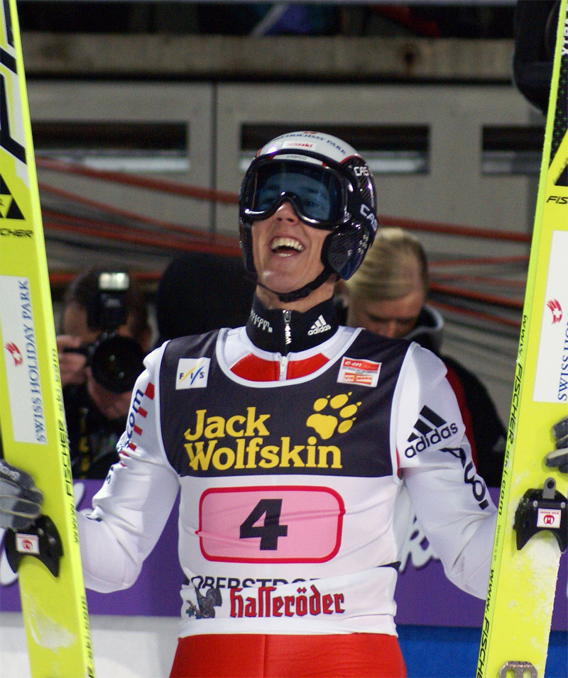 Andreas Küttel springt an der Vierschanzentournee 06/07 in Oberstdorf auf den zweiten Platz